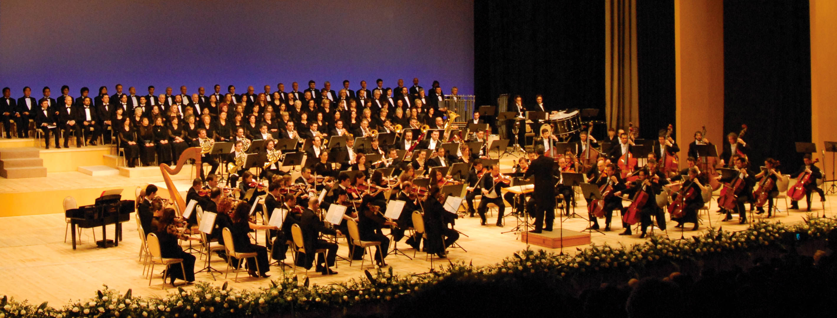 Mstislav Rostropoviç adına Beynəlxalq musiqi festivalında Azərbaycan Dövlət Simfonik Orkestrının çıxışı, drijor Rauf Abdullayev